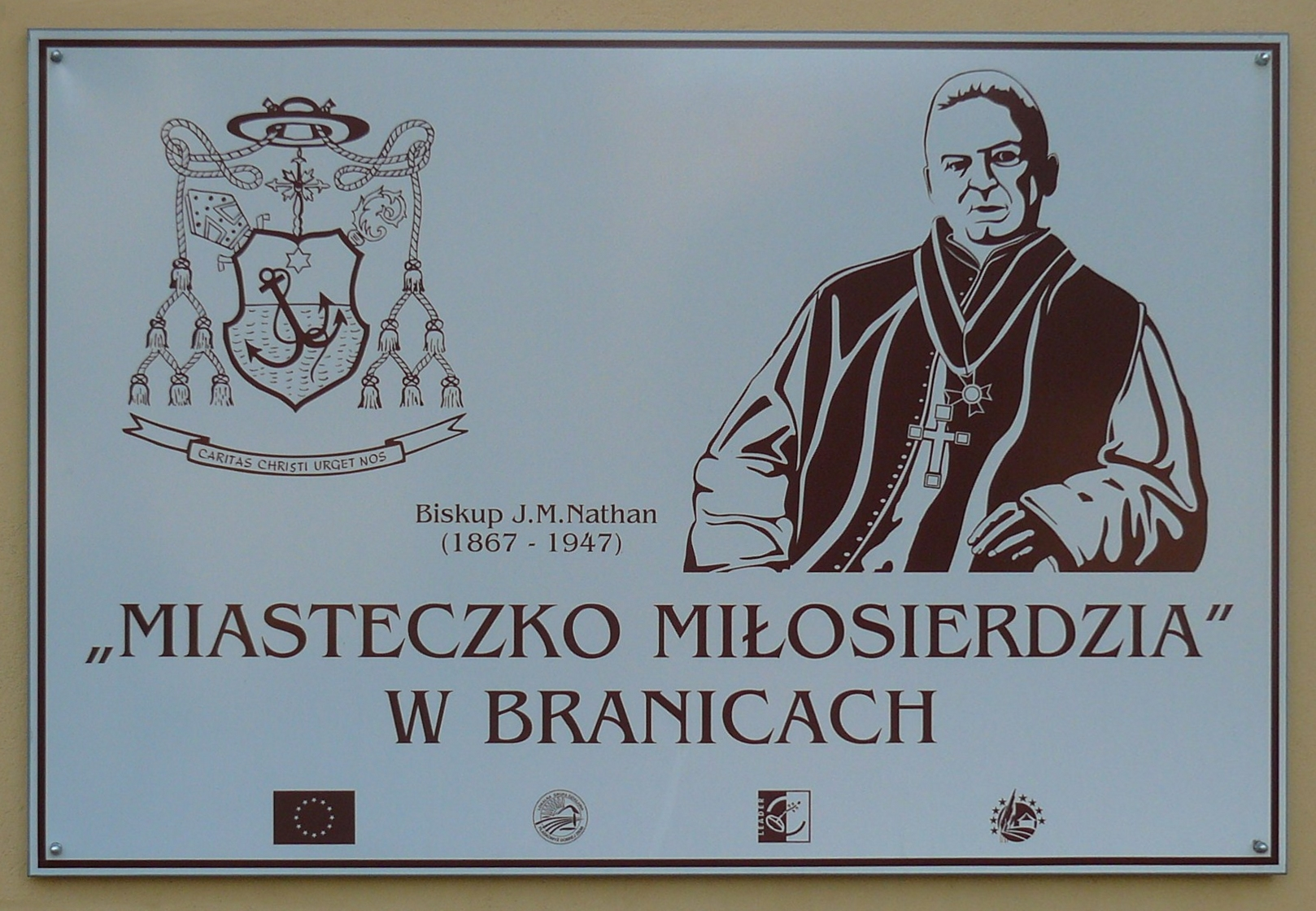 Gedenktafel an Bischof Joseph Martin Nathan (1867-1947), Gründer der Branitzer Heil- und Pfleganstalten in Branitz, Schlesien, heute Branice, Polen.